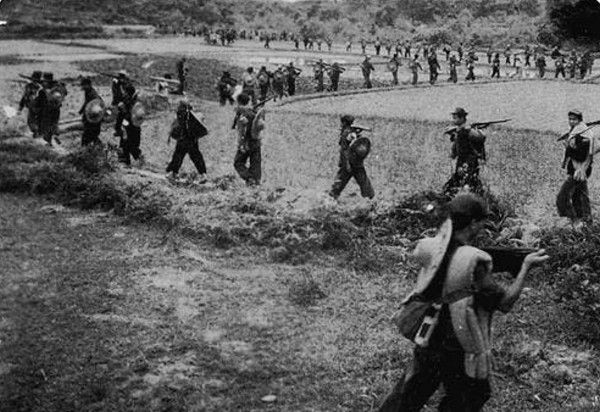 中文（香港）: 東江縱隊港九獨立大隊在香港邊界附近行軍情況。（香港政府檔案處、1945年）